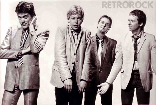 The Jags en 1978